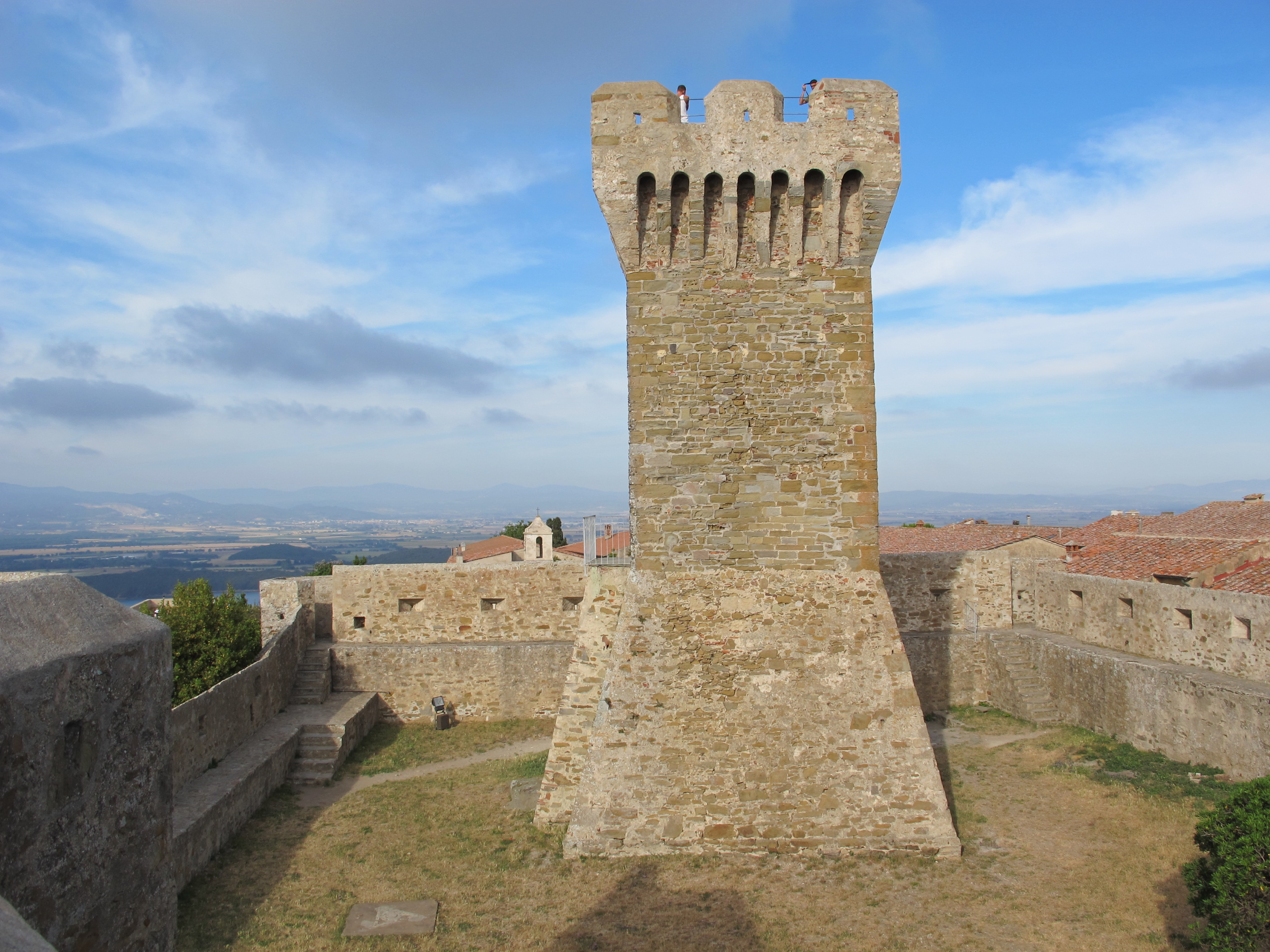 Rocca di populonia, torre